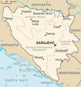 Bosnia ja Hertsegoviina kaart